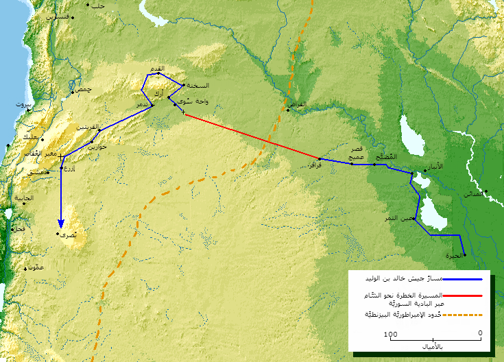 خارطة تُبيِّنُ مسار جيش خالد بن الوليد من العراق إلى الشَّام.